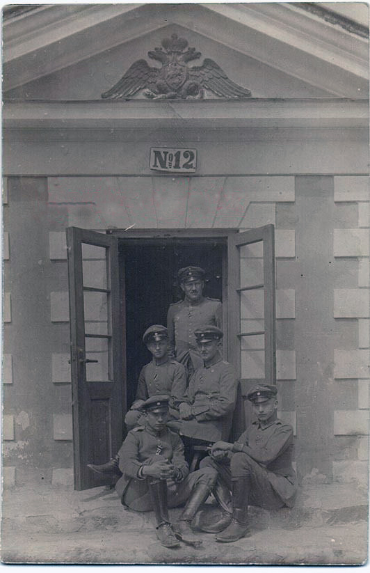 Vokiečiai pozuoja prie įėjimo į carinę Tauragės muitinę, 1915 m. birželis.